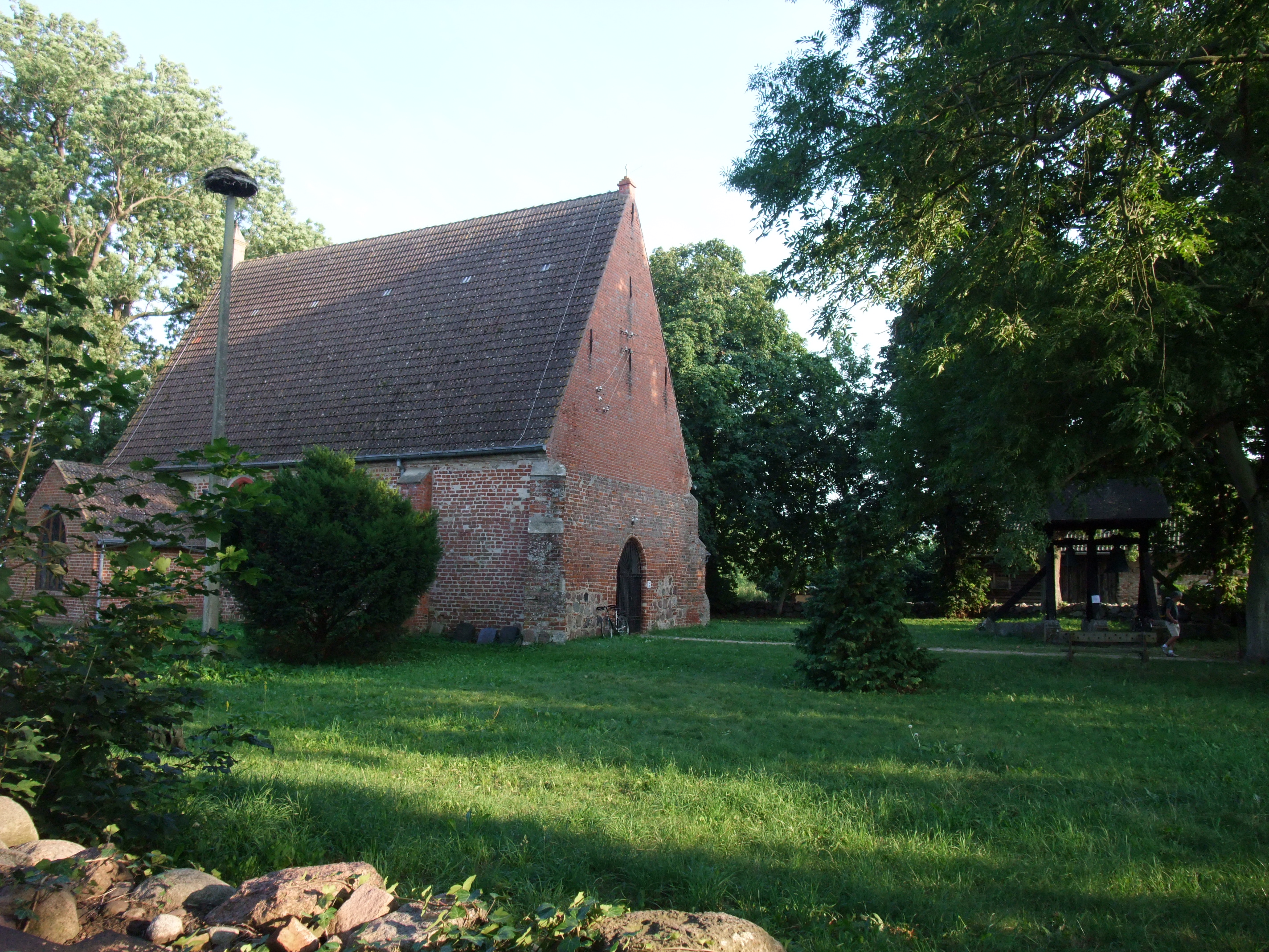 Marienkirche Netzelkow, Lütow, Deutschland